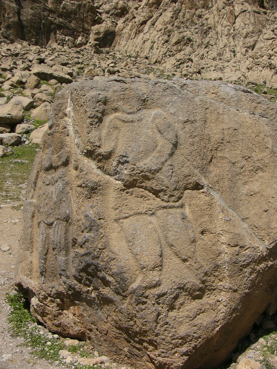 سنگ بلاش